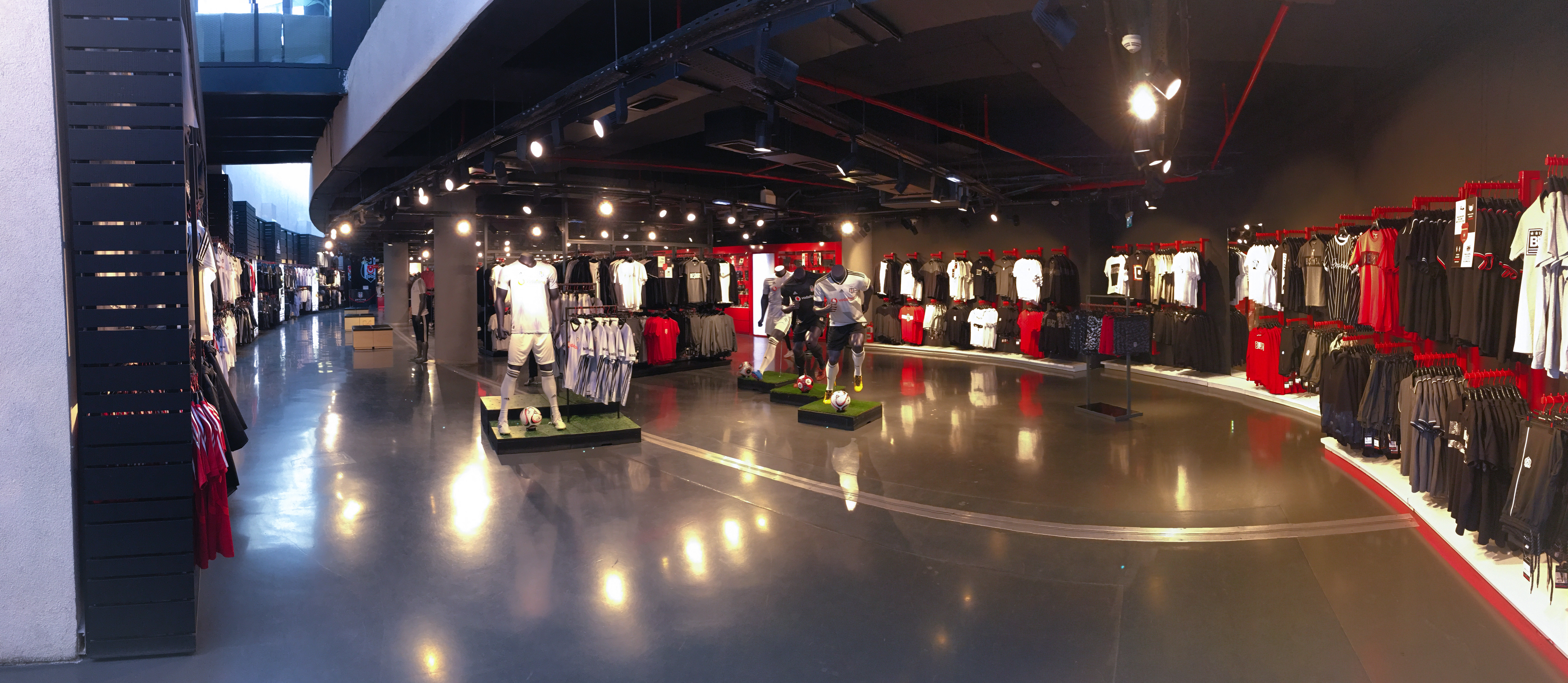 Panorama